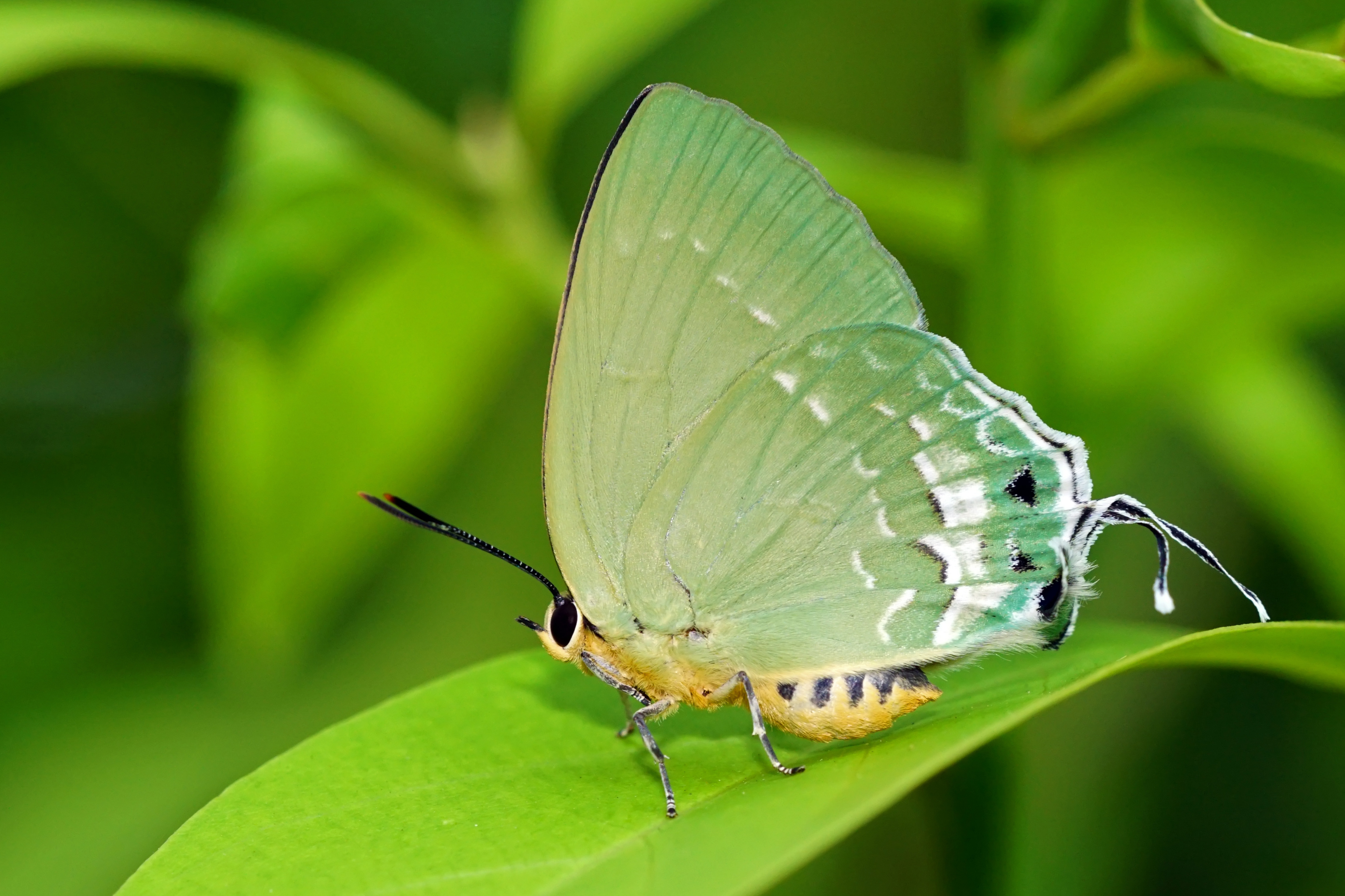 中文（台灣）: 綠灰蝶 Artipe eryx horiella